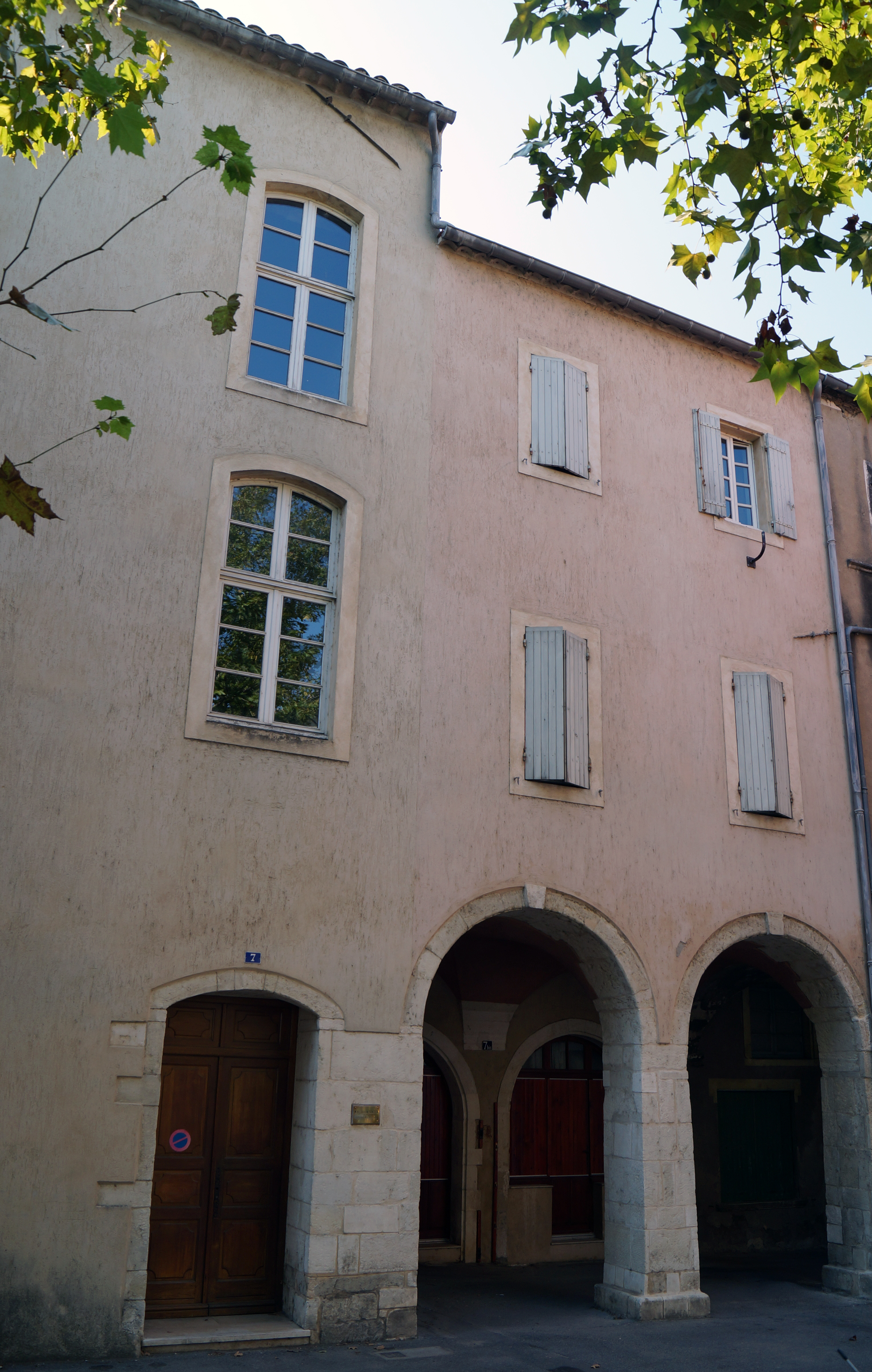 Maison, 7 place du Couvent (Inscrit, 1954) .